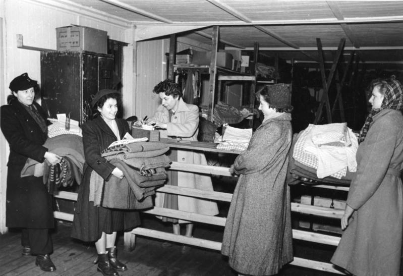 Sowjetzonenflüchtlings- Durchgangslager für Mädchen in Loccum bei Hannover